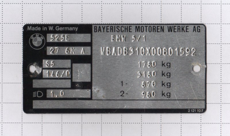 Typschild eines BMW-Kfz, ca 4,5 x 9,2 cm